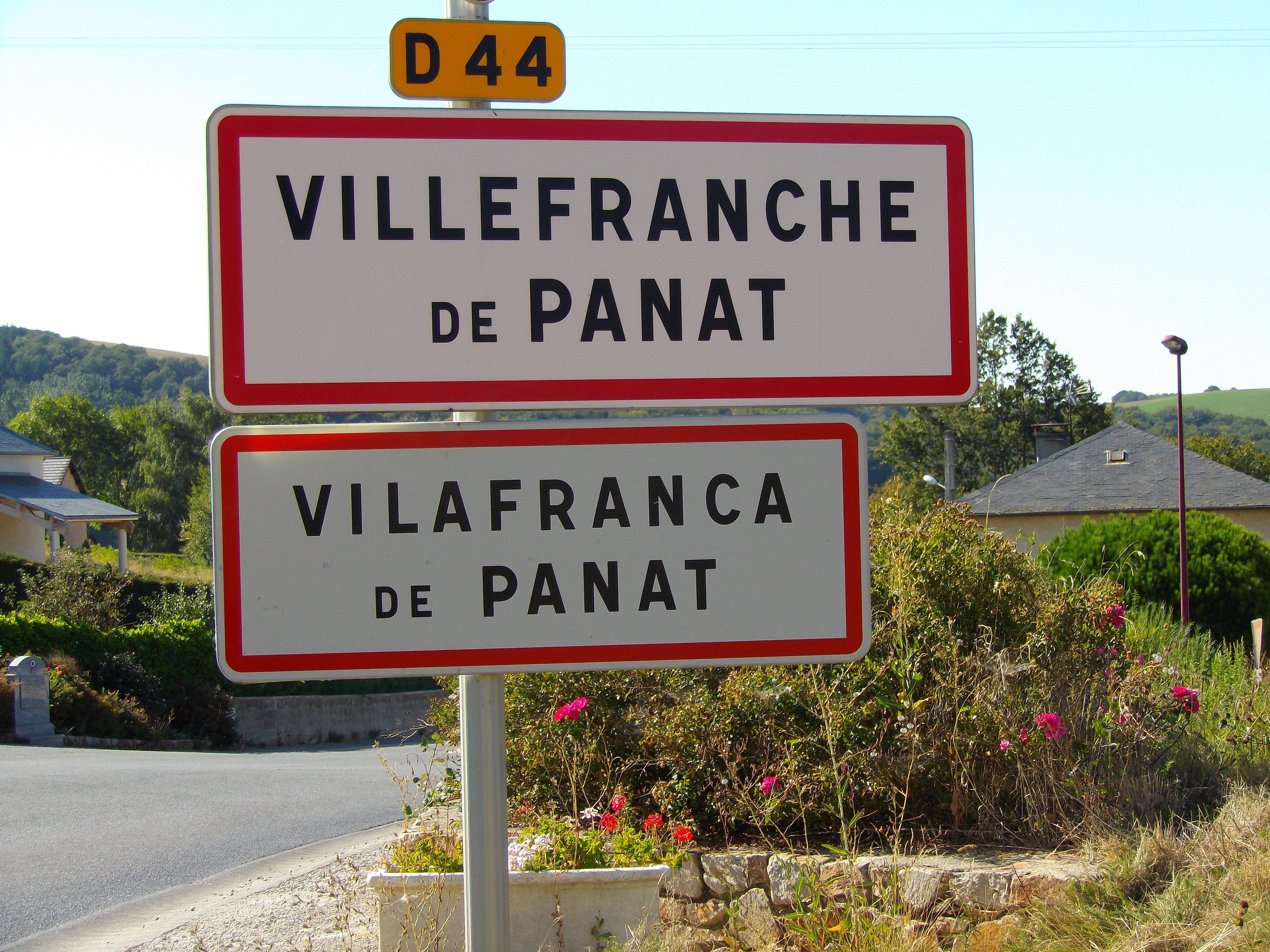 Panneau bilingue français-occitan à l'entrée de Villefranche-de-Panat (Aveyron, France)